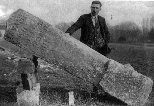 Photographie de l'une des huit bornes miliaire signalant la via romana de Poitiers-Le Mans, retrouvée à Cénon-sur-Vienne au début du XXe siècle.